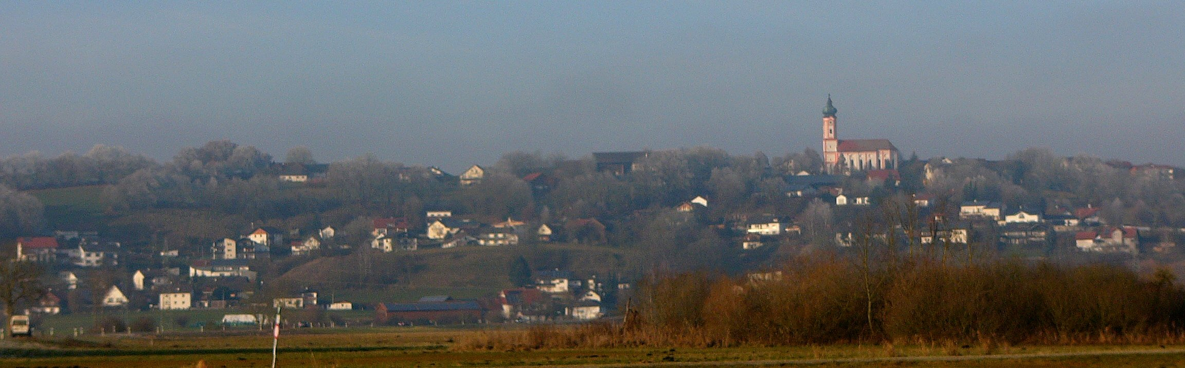 Thürnthenning - ein Ortsteil der Gemeinde Moosthenning.